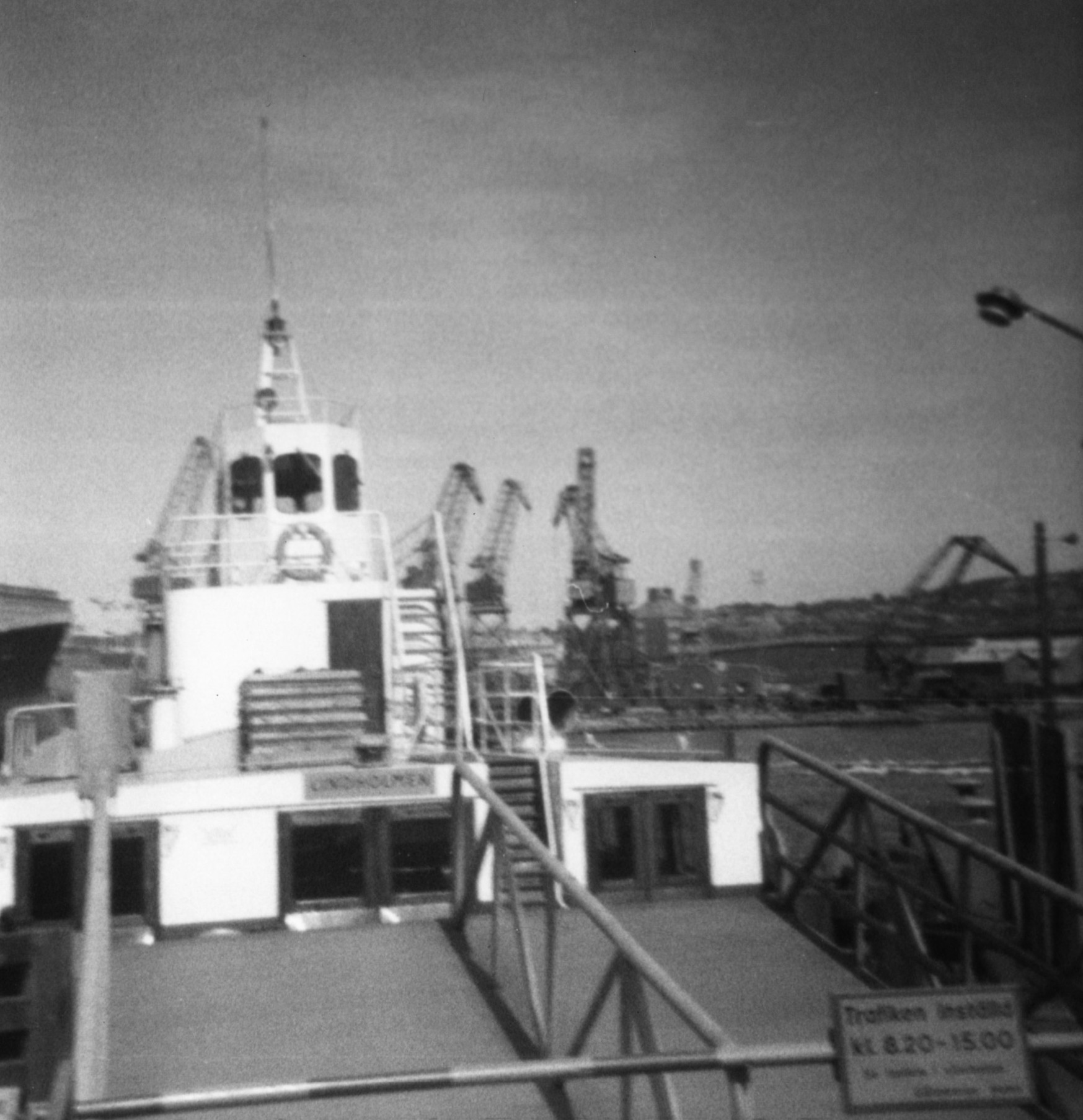 Älvfärja "Dan Axel Broström", Stenpiren (1975)